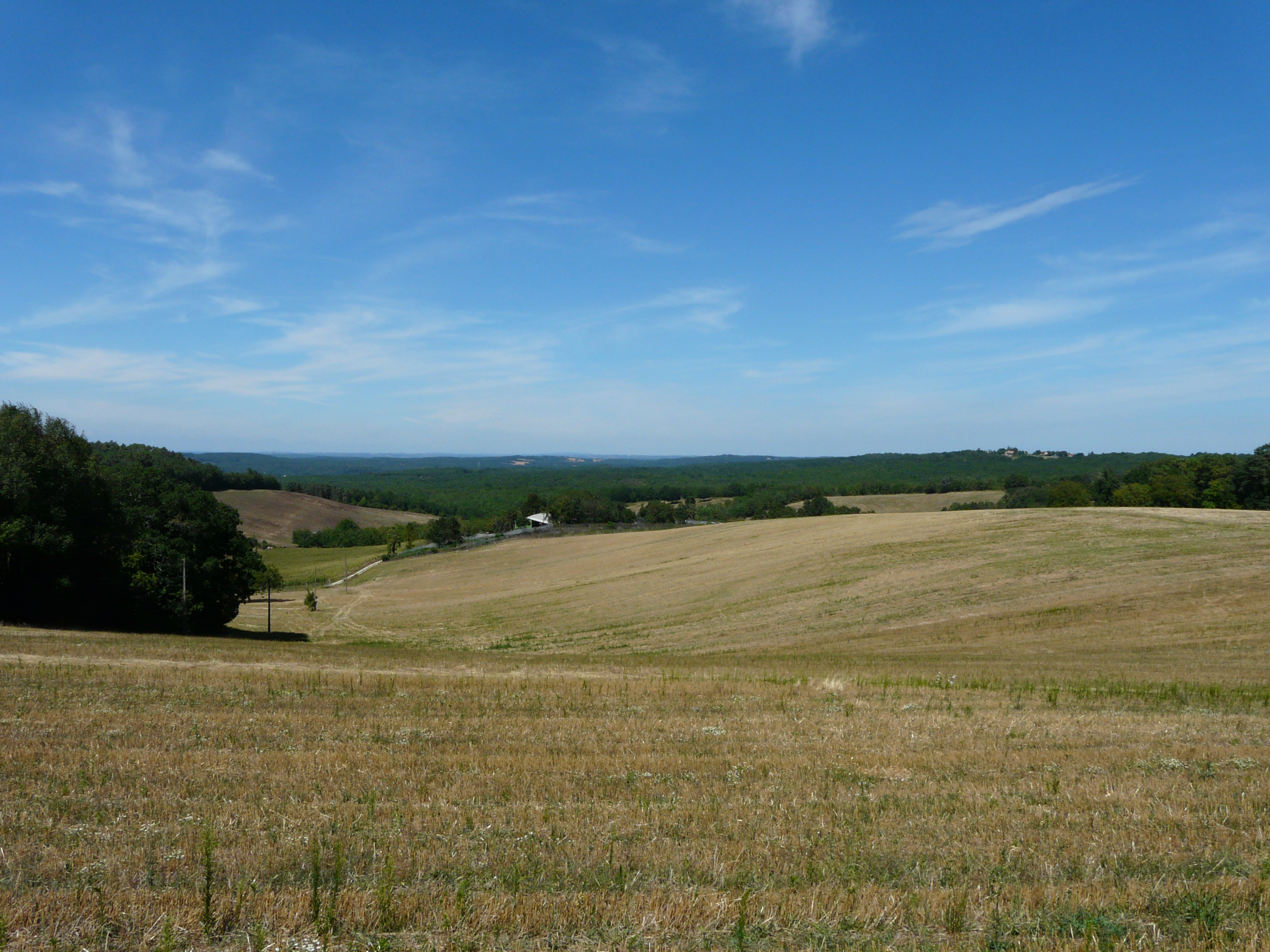 Le Périgord central en direction de la Miranderie, à l'ouest de Seylhiac. Communes de Blis-et-Born (à gauche) et Montagnac-d'Auberoche (à droite), Dordogne, France.